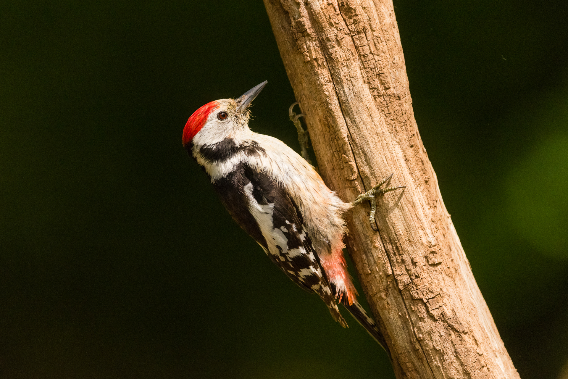 Mittelspecht (Dendrocopos medius)